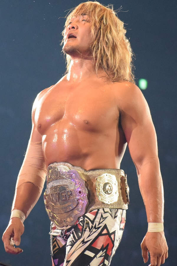 2017年6月11日 大阪城ホール「DOMINION 6.11 in OSAKA-JO HALL」 棚橋弘至